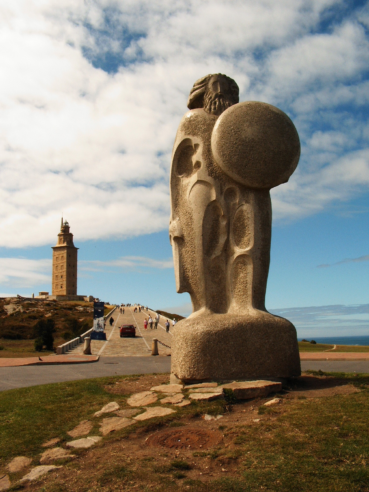 Escultura de Breogán en La Coruña (España), con la Torre de Hércules al fondo.